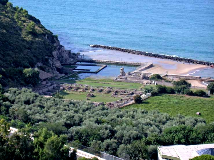 Sperlonga (Italia, Lazio, provincia di Latina). I resti della villa di Tiberio, dalla strada per Itri.